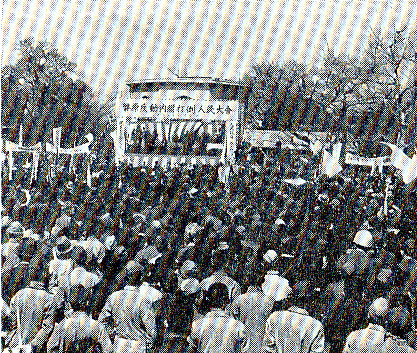 昭和２１年４月７日に日比谷公園で行われた倒閣大会。壇上にはw:石橋湛山、徳田球一、鈴木茂三郎ら。